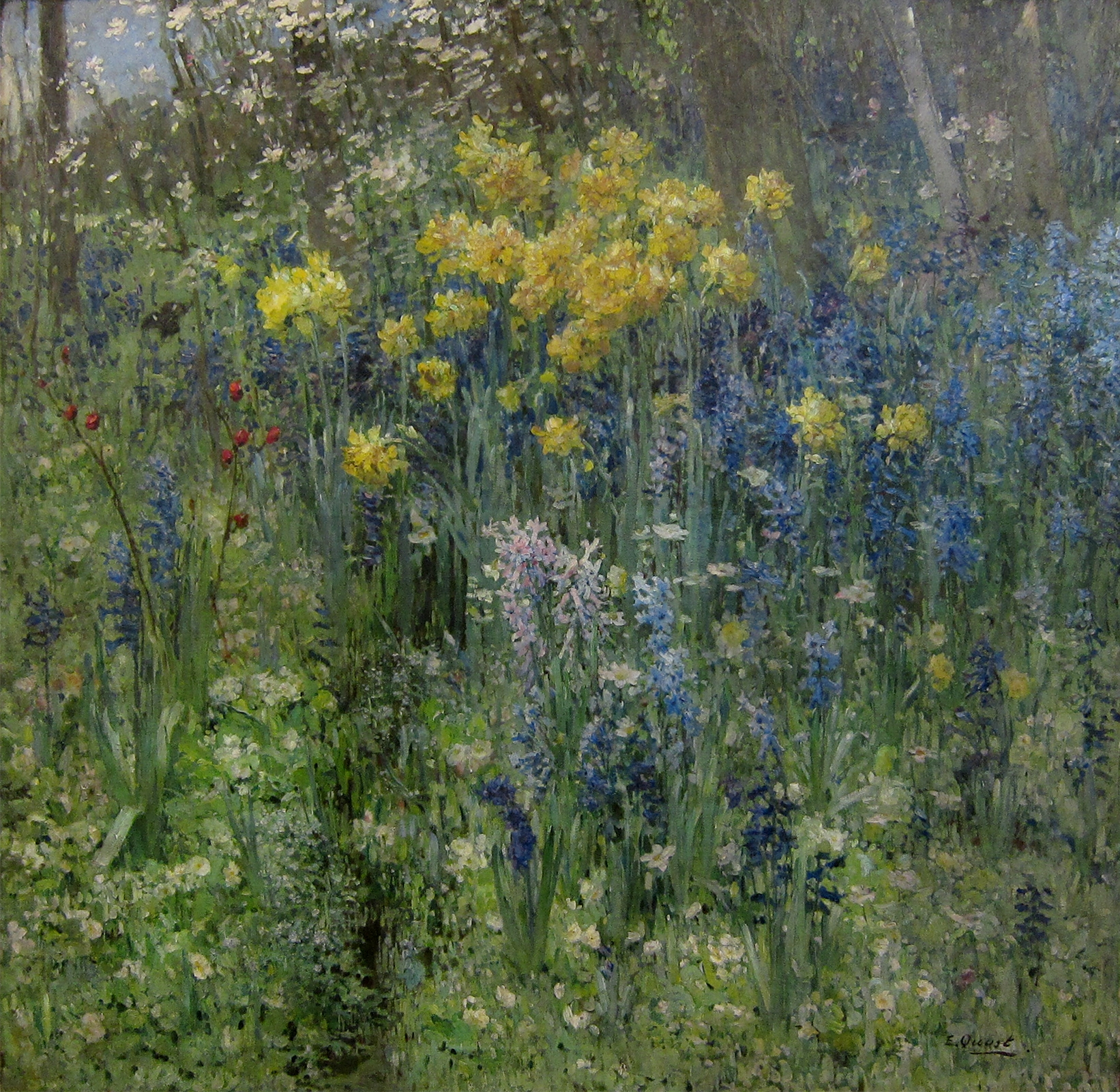 «Fleurs de Pacques» d'Ernest Quost (1890) au Musée d'Art et d'Industrie de Roubaix.